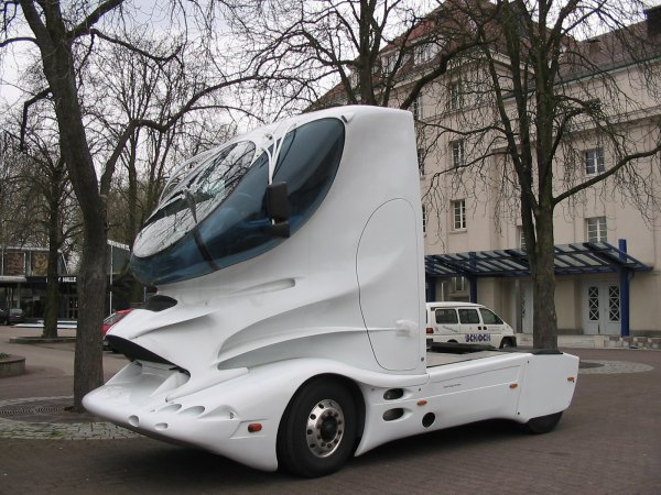 Von Luigi Colani designter LKW. Fotografiert vor dem Kongresszentrum in Karlsruhe.